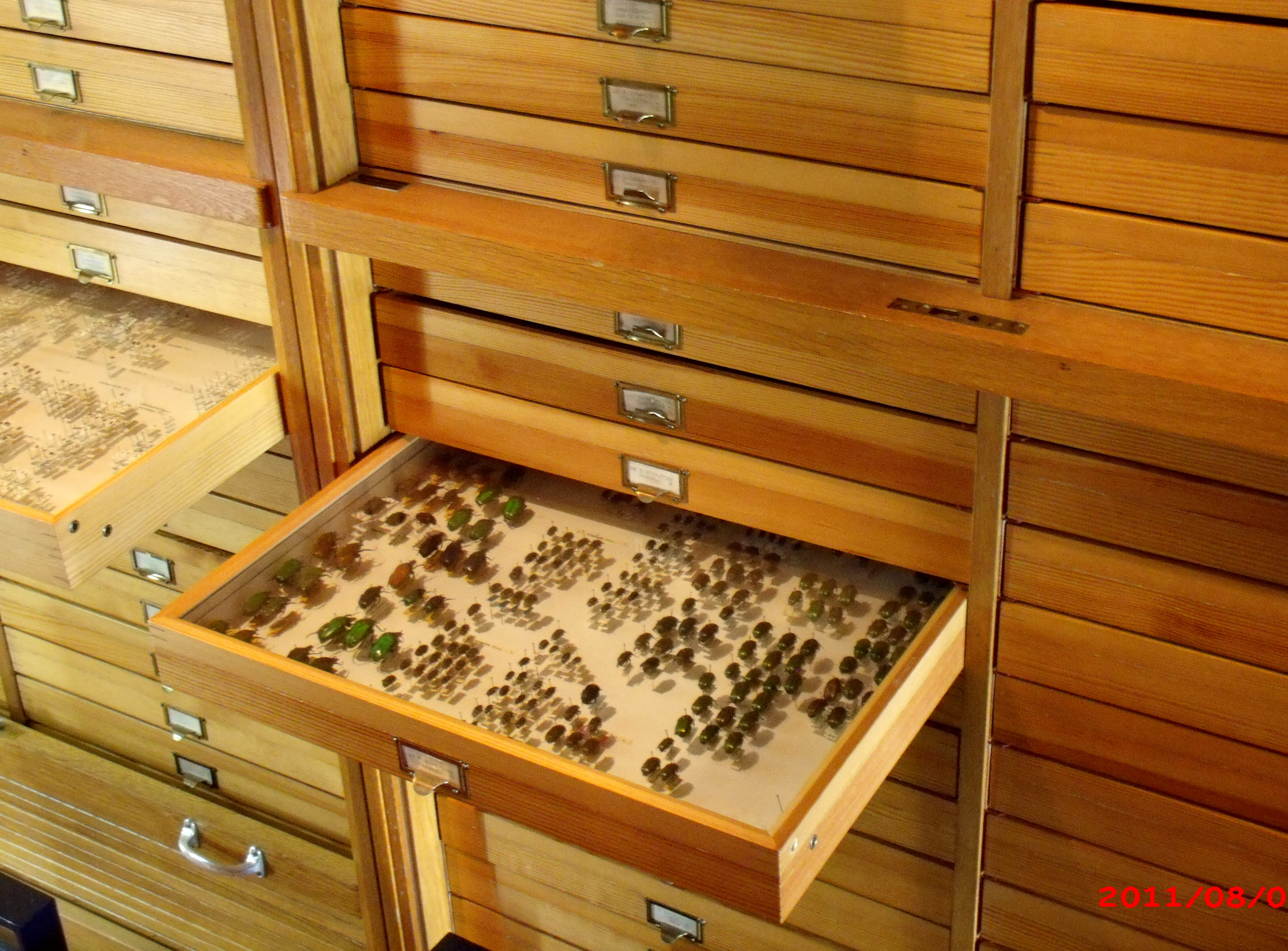 Käfersammlung im Flur erster Stock